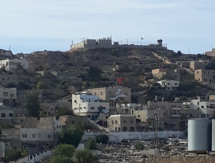 בסיס צהל שהוקם בראש גבעת אבו סניינה בנקודה ממנה ירה צלף פלסטיני ורצח את שלהבת פס